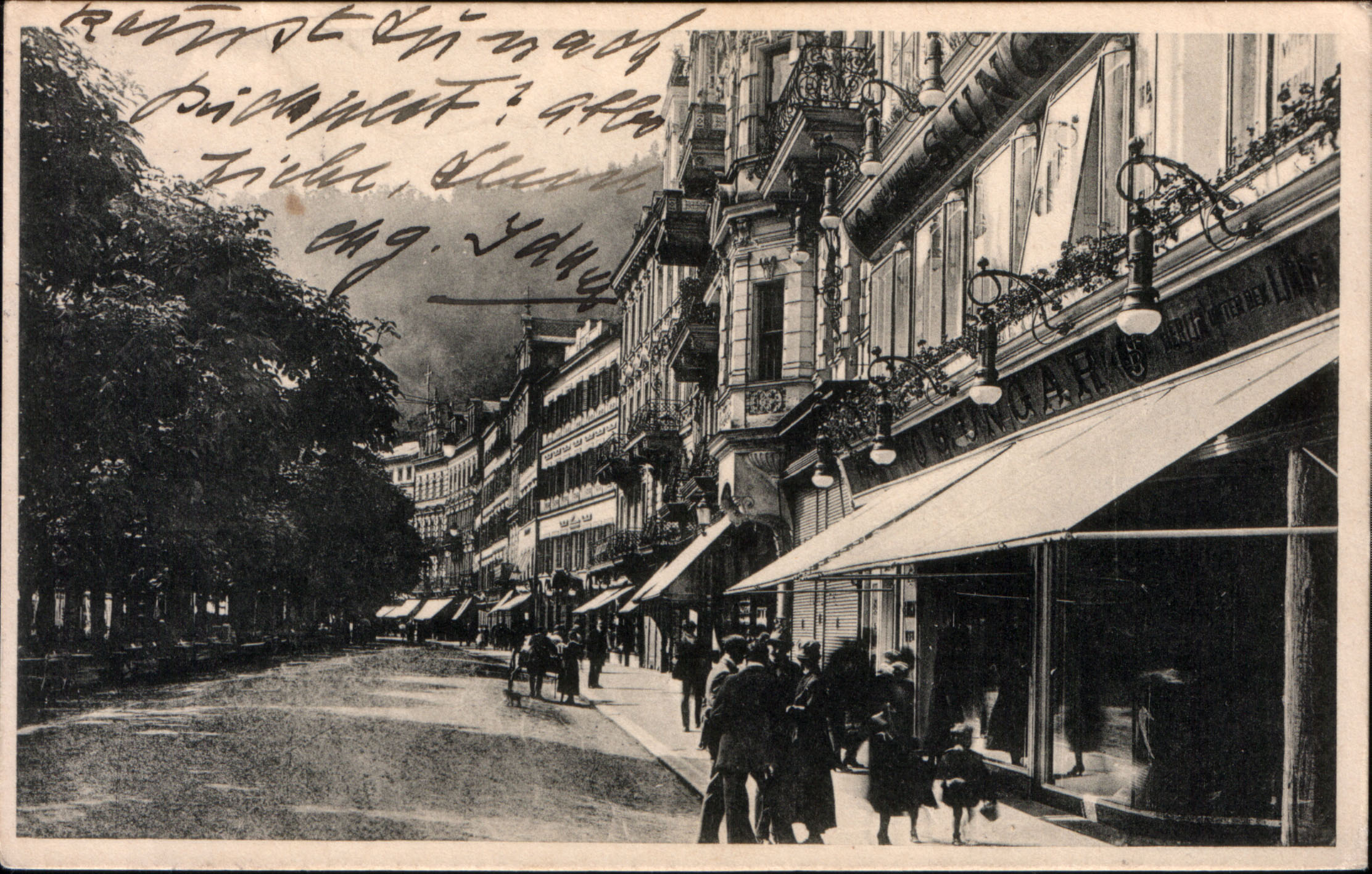 Karlovy Vary régi képeslapon